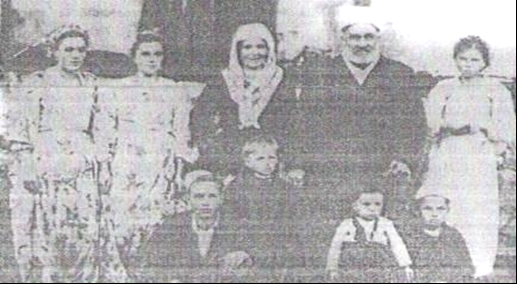 Mulla Jakup Kadroviq me familje